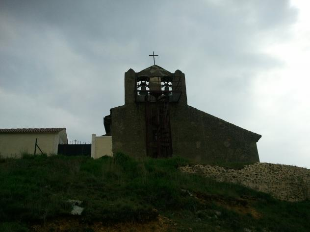 Iglesia de Carbonera.